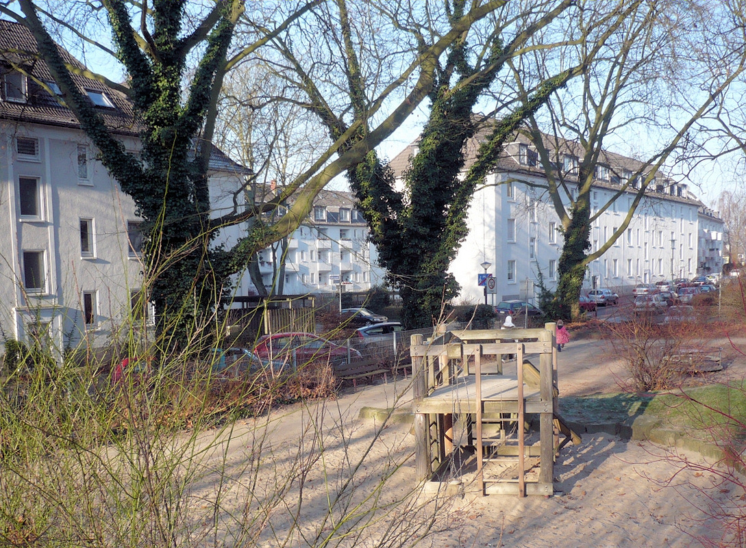 Essen Pottgießerhof, Pottgießerstraße